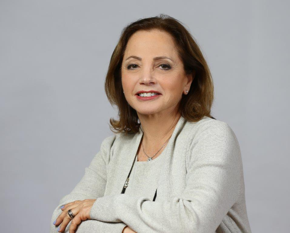 יהודית יובל רקאנטי